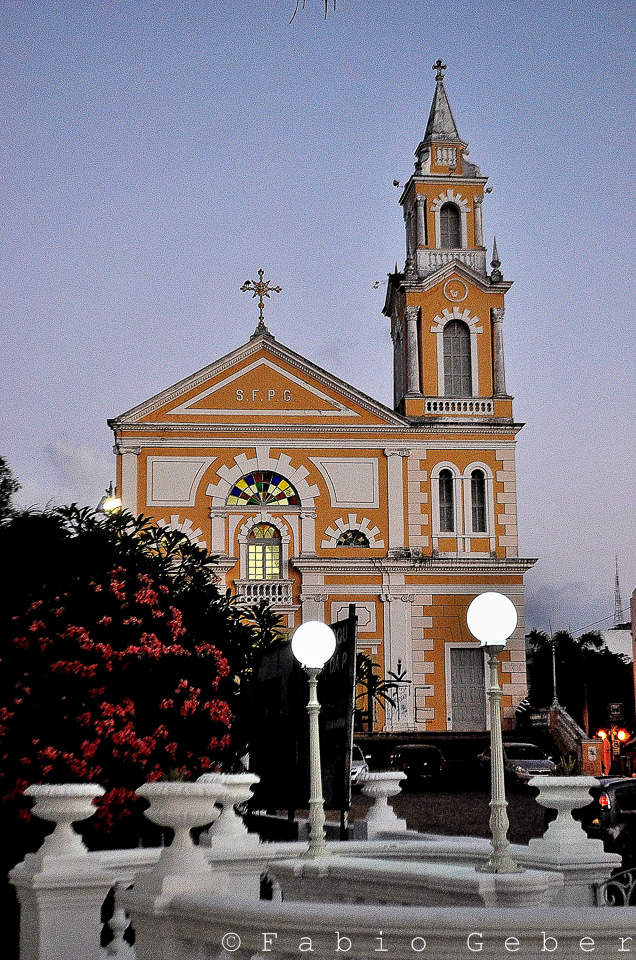 Centro Histórico de João Pessoa - PB